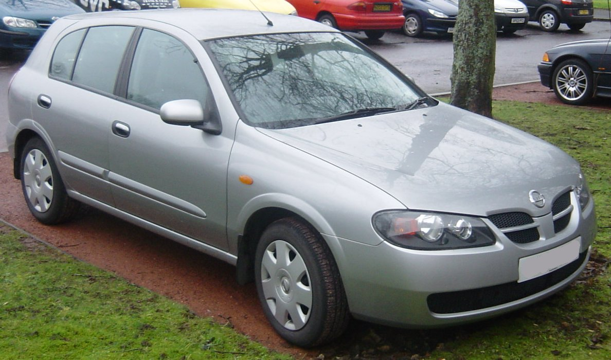 taken by Mazurka